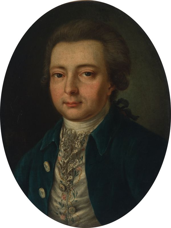 Беларуская (тарашкевіца): Партрэт невядомага. Магчыма, Міхала Антонія Сапегі (Michał Antoni Sapieha)